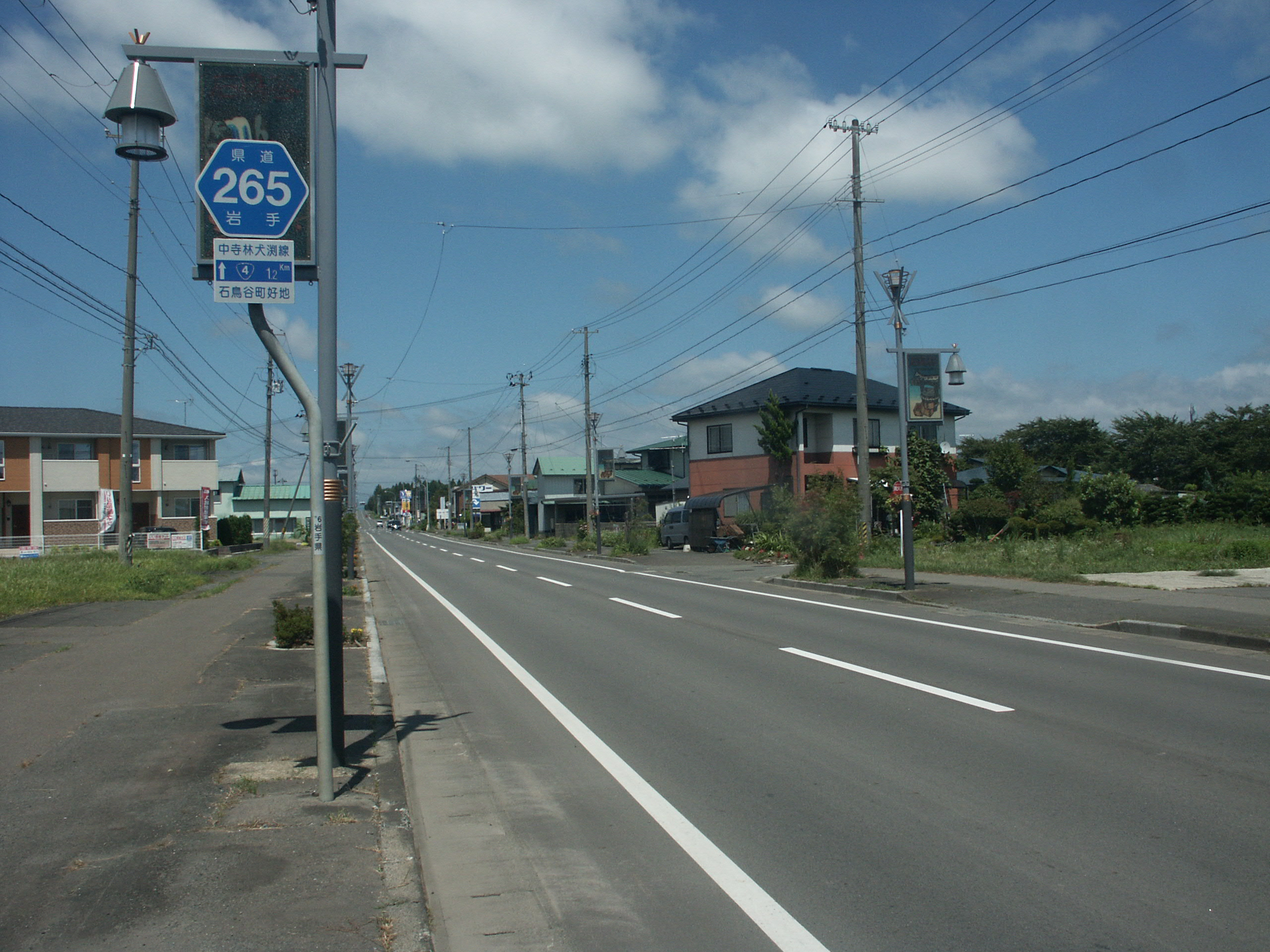 岩手県道２６５号線花巻市好知付近